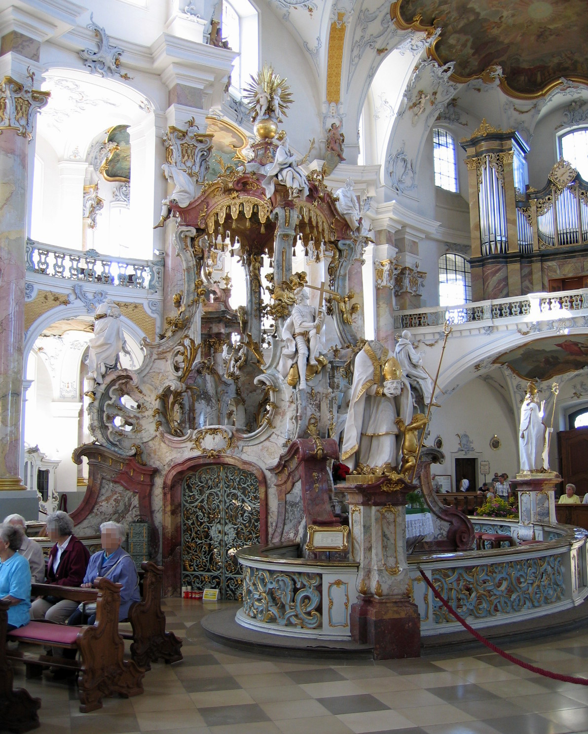 Gnadenaltar in der Basilika Vierzehnheiligen. Johann Michael Feuchtmayer (1696–1772) Alternative namesJohann Michael Feichtmayr (3)Description German sculptor Date of birth/death17 October 16964 June 1772Location of birth/deathHaid bei WessobrunnAugsburgAuthority control VIAF: 37716385 LCCN: nr94017622 GND: 118974459 WorldCat